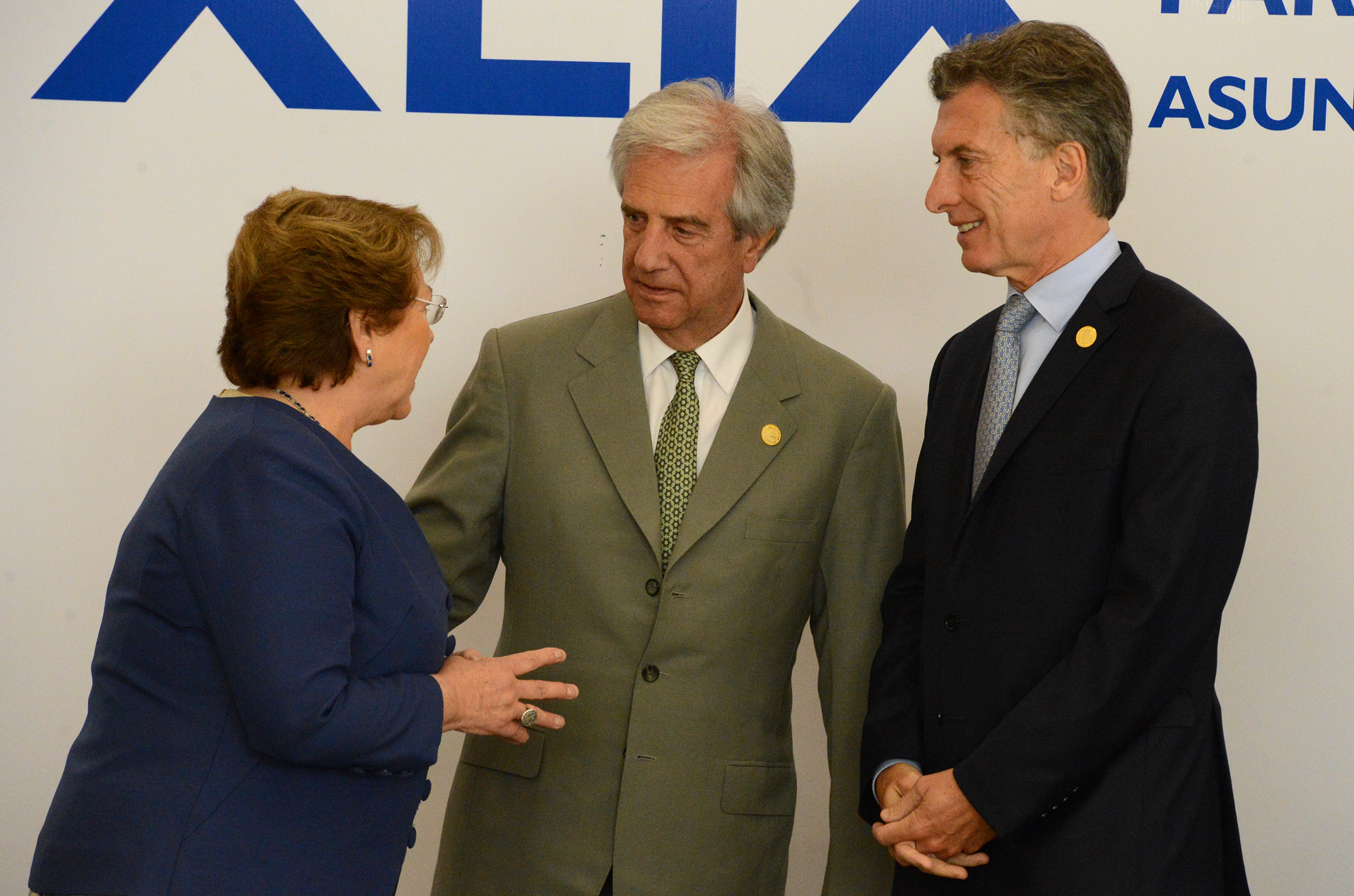 El presidente argentino Mauricio Macri conversa con sus pares Tabaré Vázquez (Uruguay) y Michelle Bachelet (Chile), en la previa de la foto oficial de la 49° Cumbre del Mercosur, 21 de diciembre de 2015, Asunción, Paraguay.